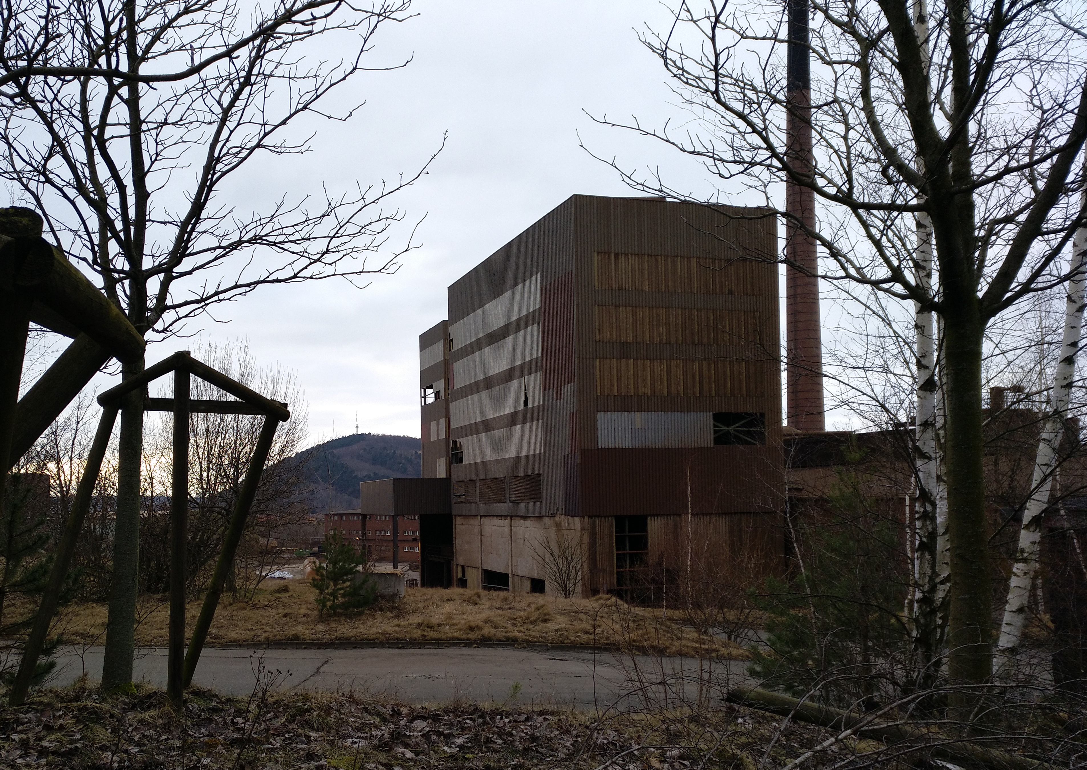 Nordwestperspektive auf Schmelzzyklon, Zinkoxydhütte Oker, 2018